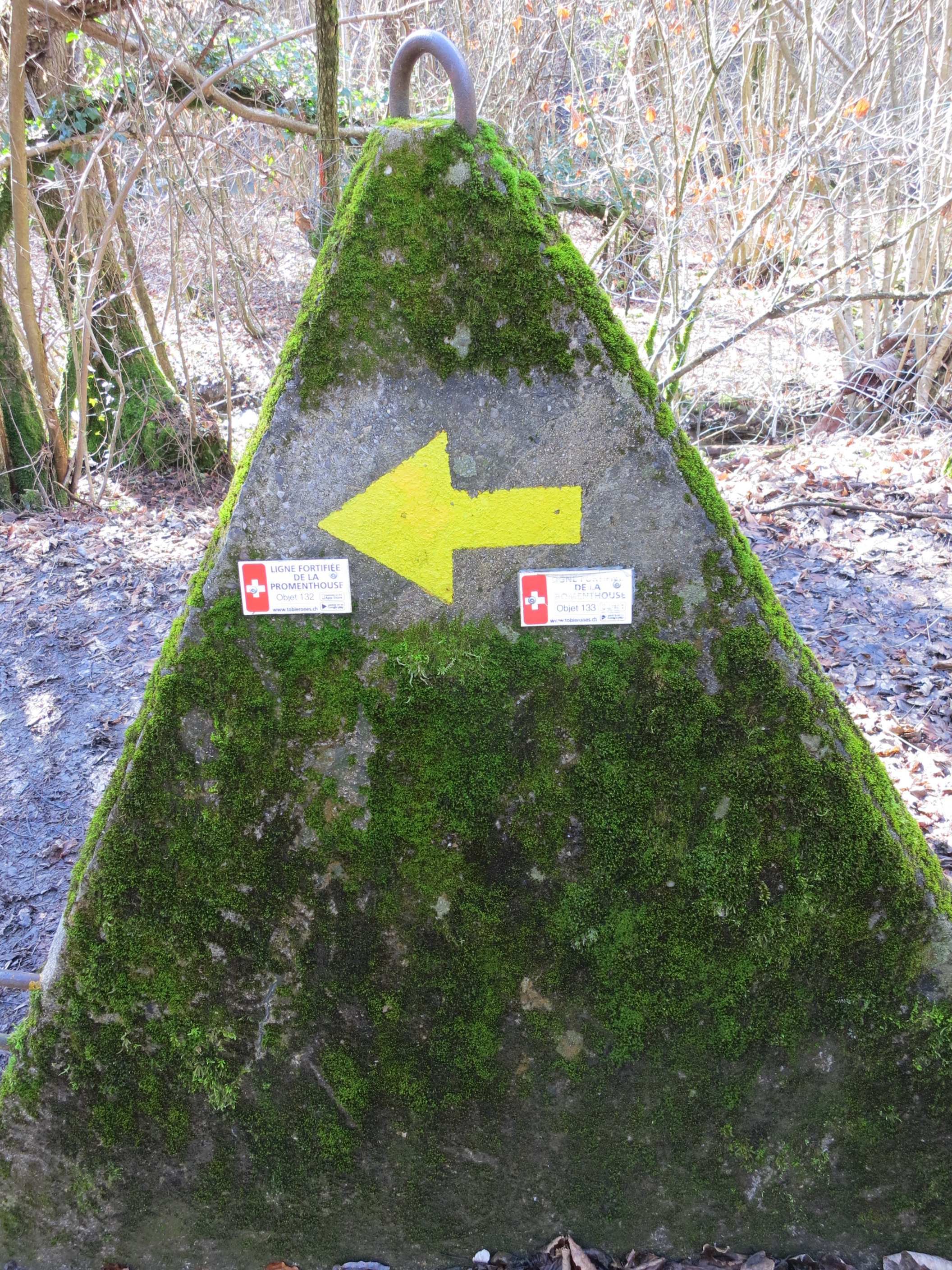 Panzersperre, Begnins VD, Schweiz